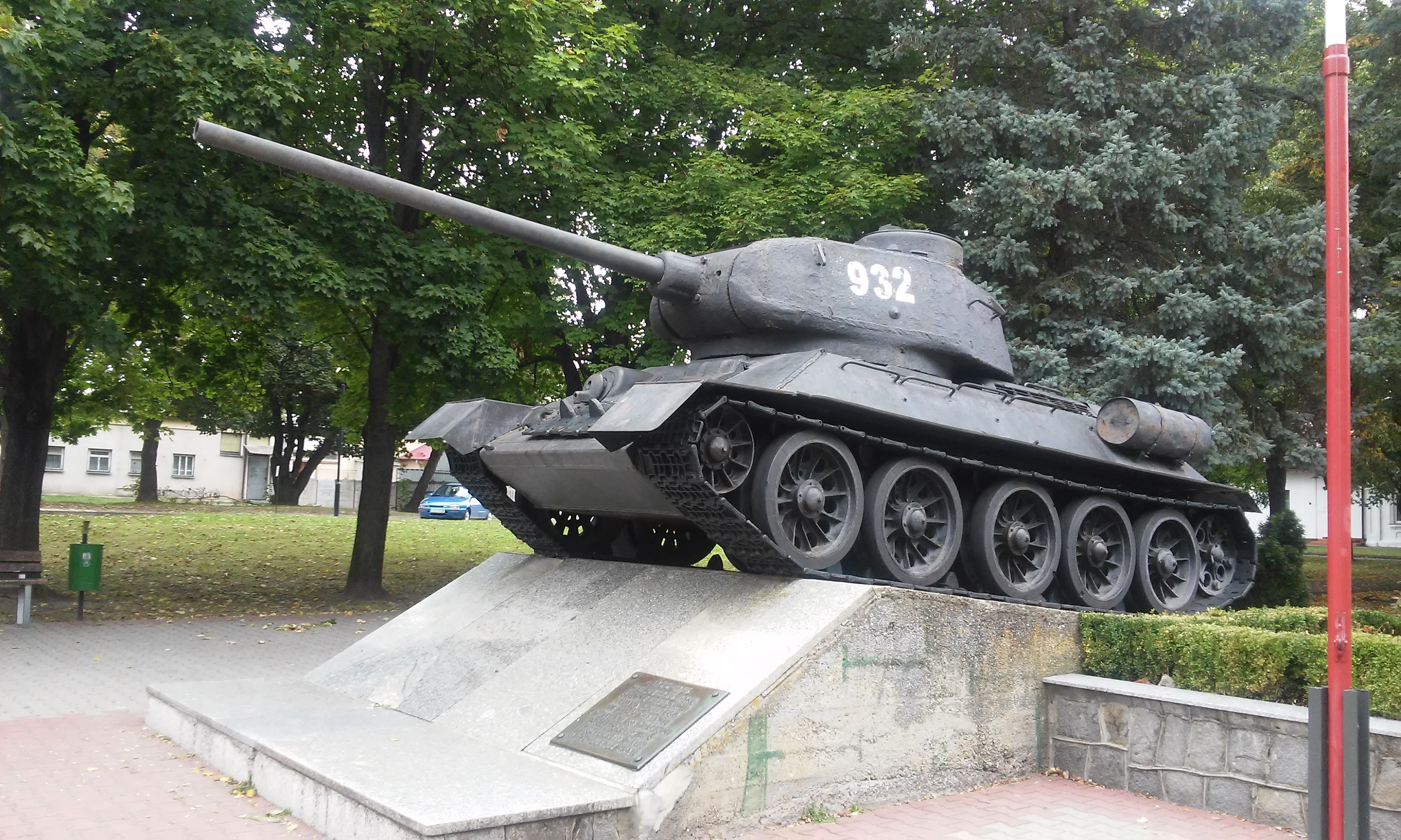 Czołg-pomnik w Dubience, upamiętniający przekroczenie Bugu w przez główne siły I Armii Wojska Polskiego